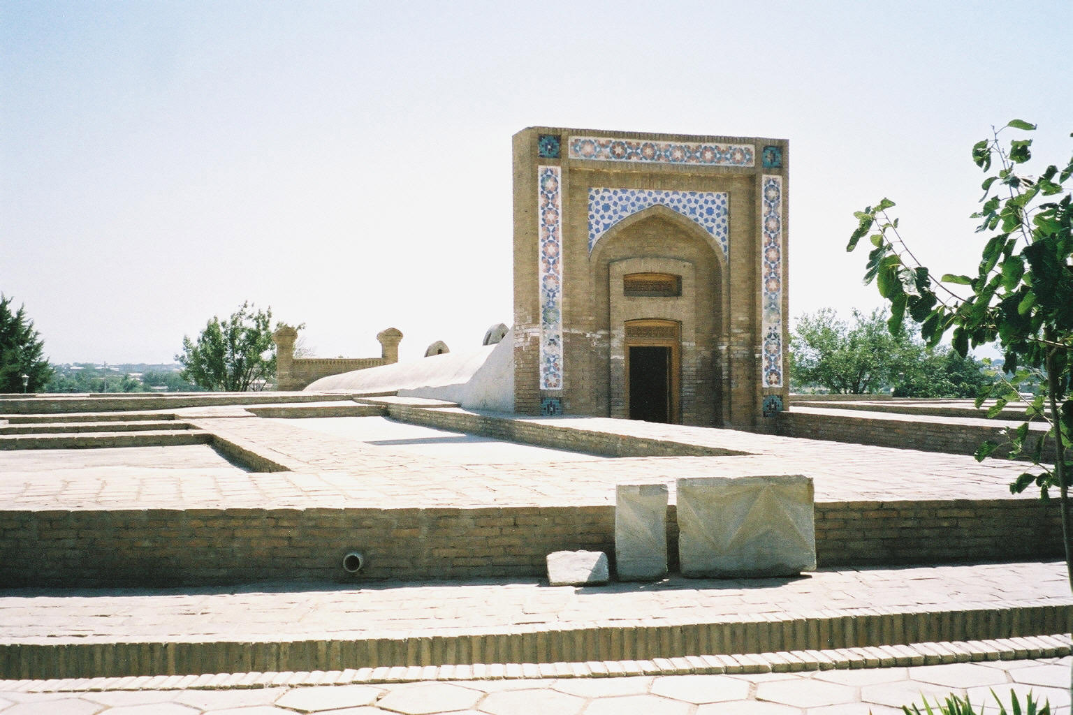 Ulugh Beg est un petit fils de Tamerlan passionné d'astronomie. Il fit construire cet observatoire muni d'un astrolabe géant de 40,4 mètres de diamètre. Cet observatoire a été rasé par son fils, parricide et successeur Abd al-Latif. Ce n'est qu'en 1908 que ces ruines ont été redécouvertes par des archéologues russes.